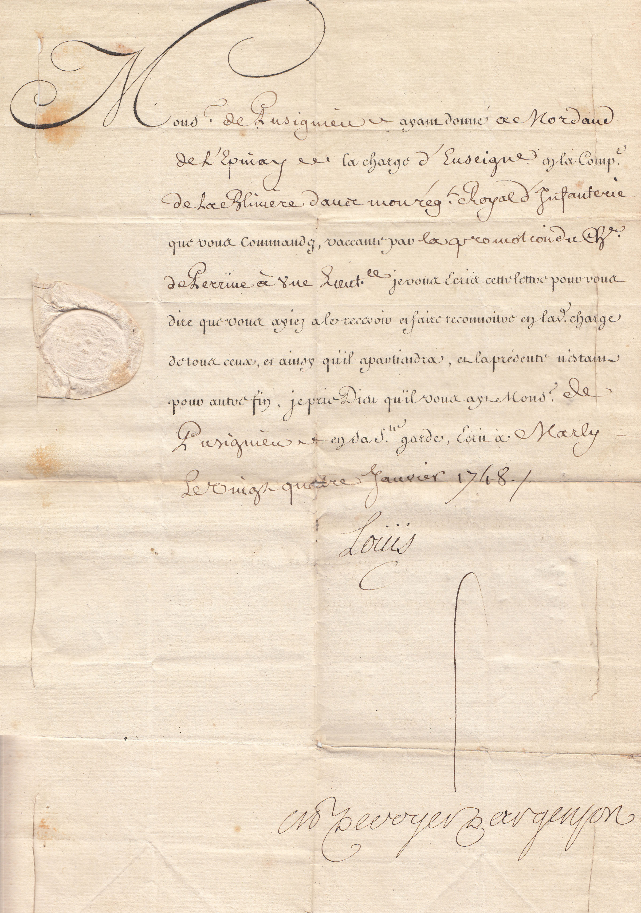 Изображение королевского письма с подписью Марка Пьера д'Аржансона о назначении в пехотном полку от 24 января 1748 года.